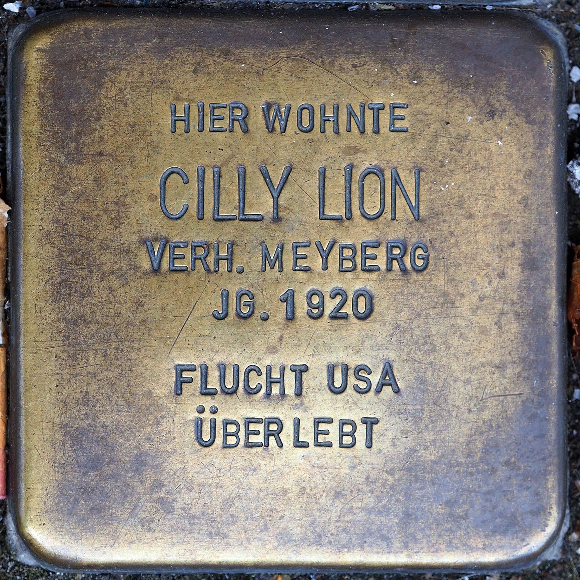 Stolpersteine Wesel: Lion, Cilly